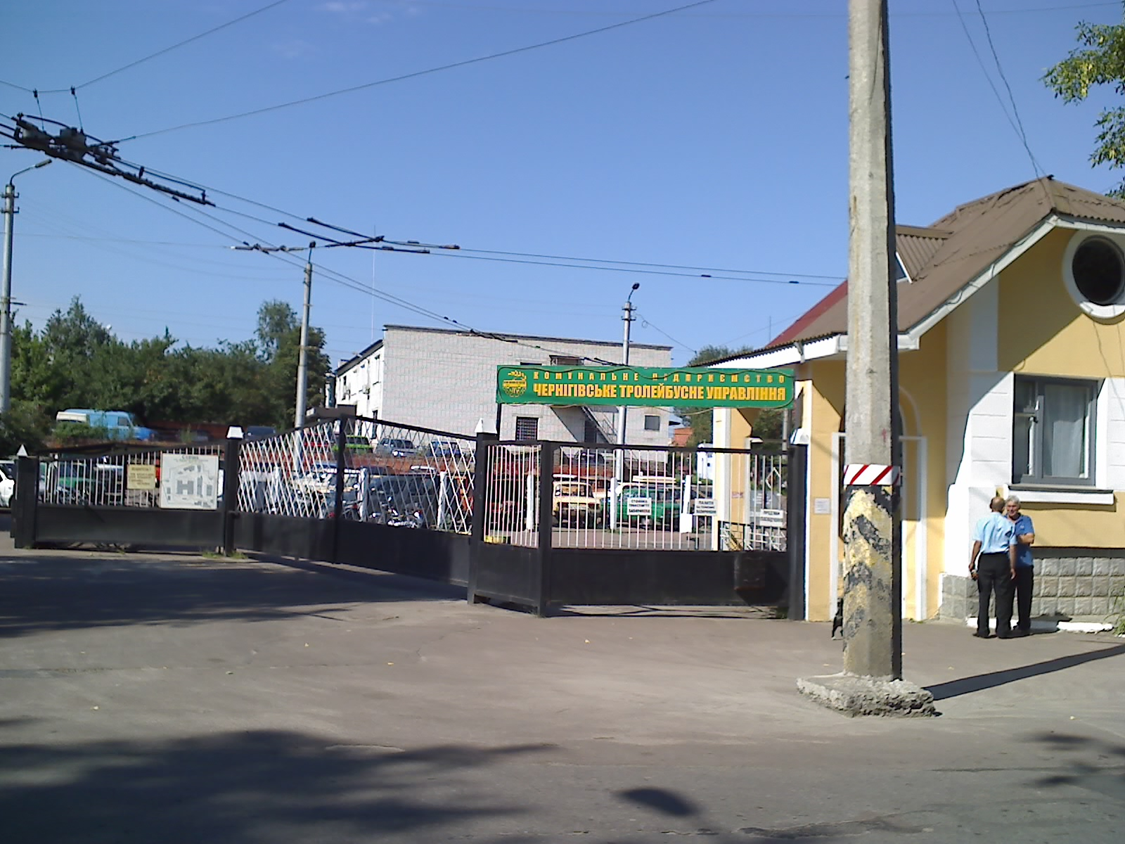 Депо Черниговского троллейбусного управления.